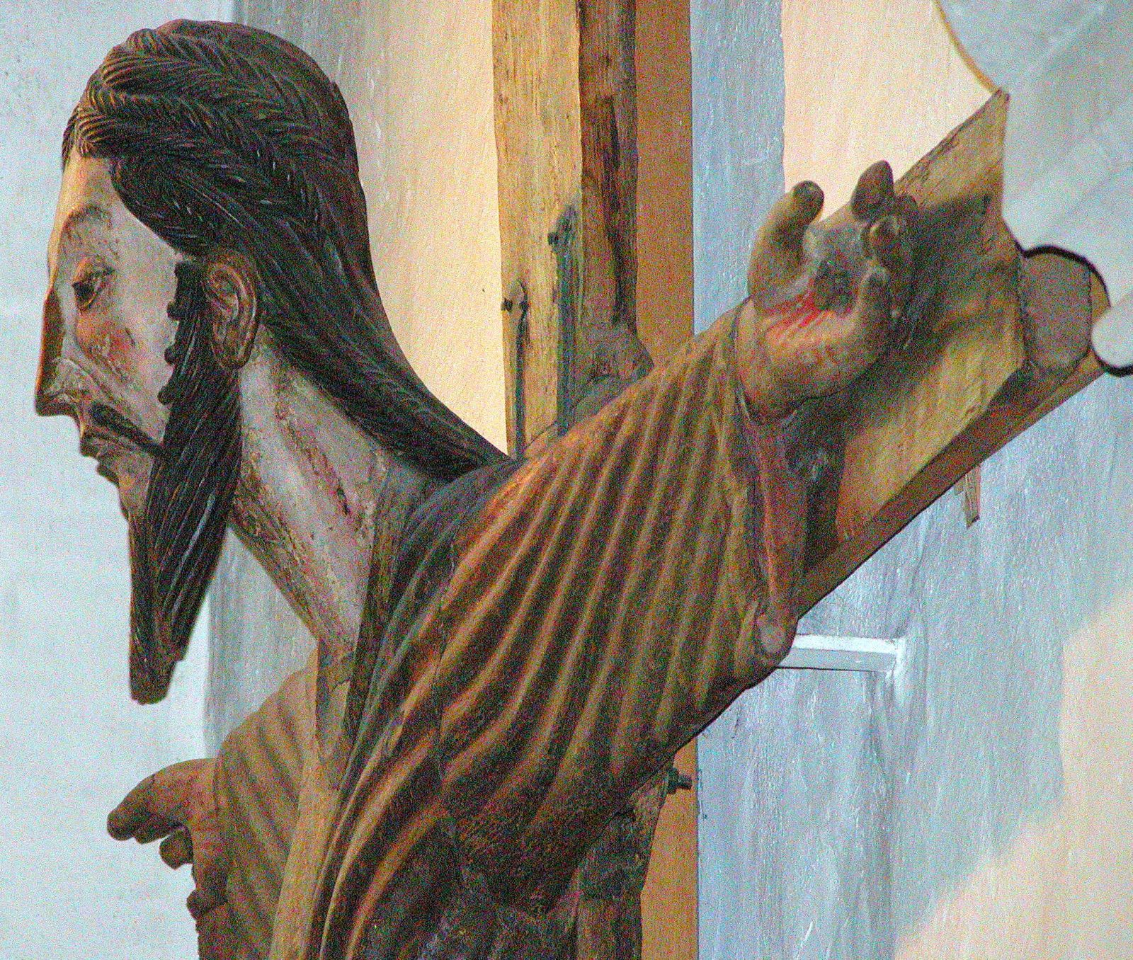 Braunschweiger Dom: Imervard-Kreuz Seitendetail